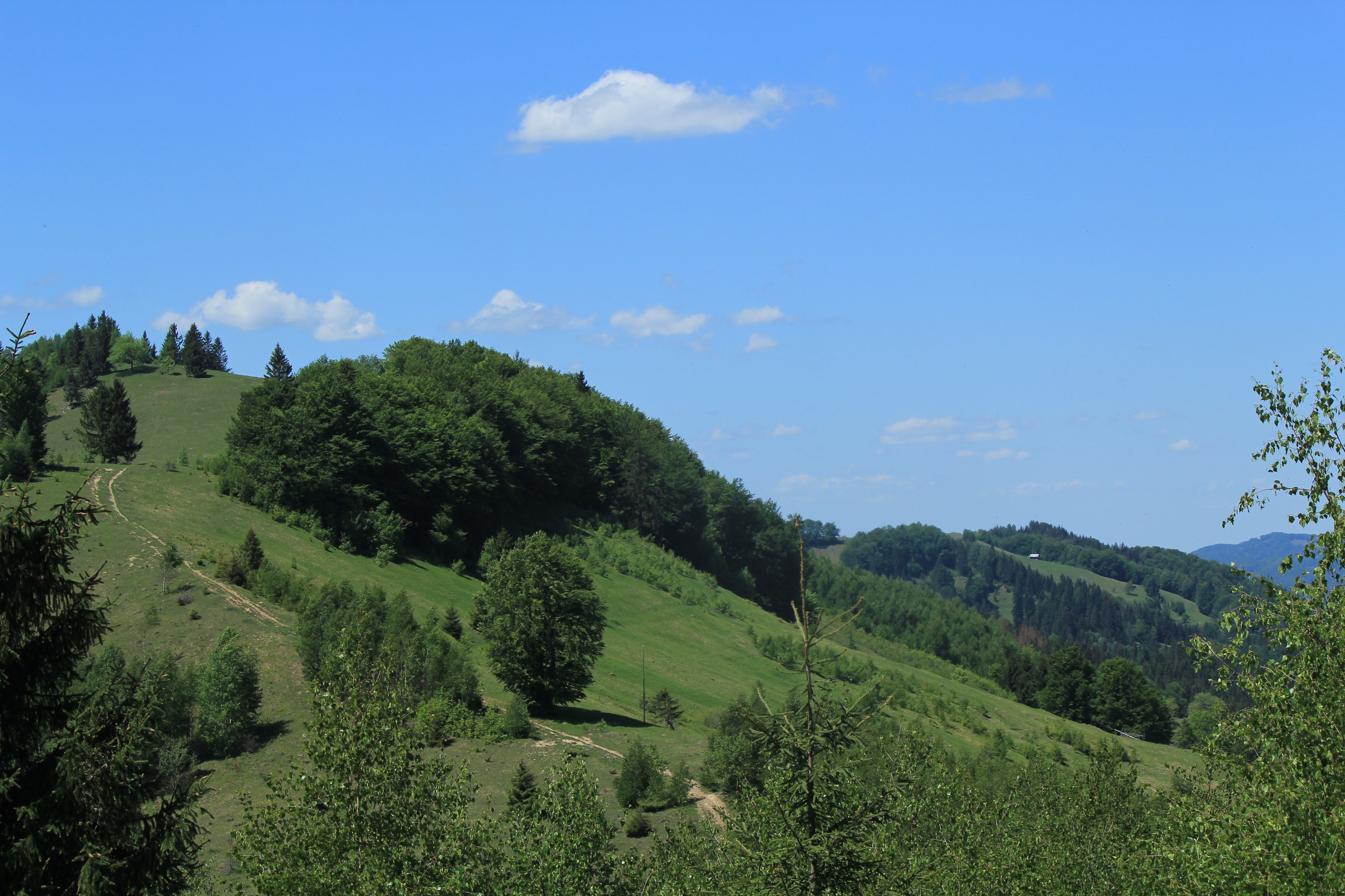 «Гуцульщина», Косівський район